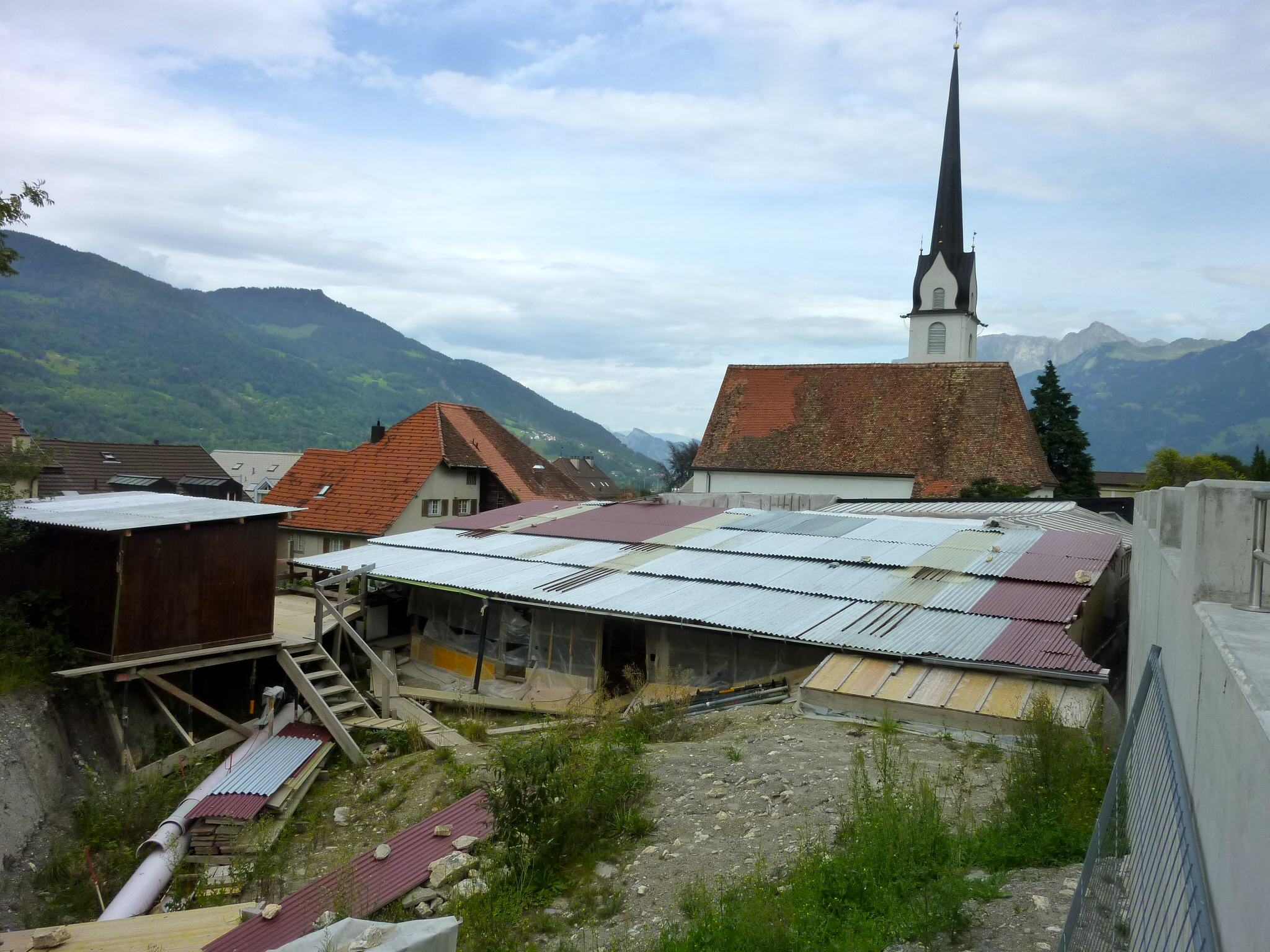 Ausgrabungsstelle der königlichen Pfalz in Zizers